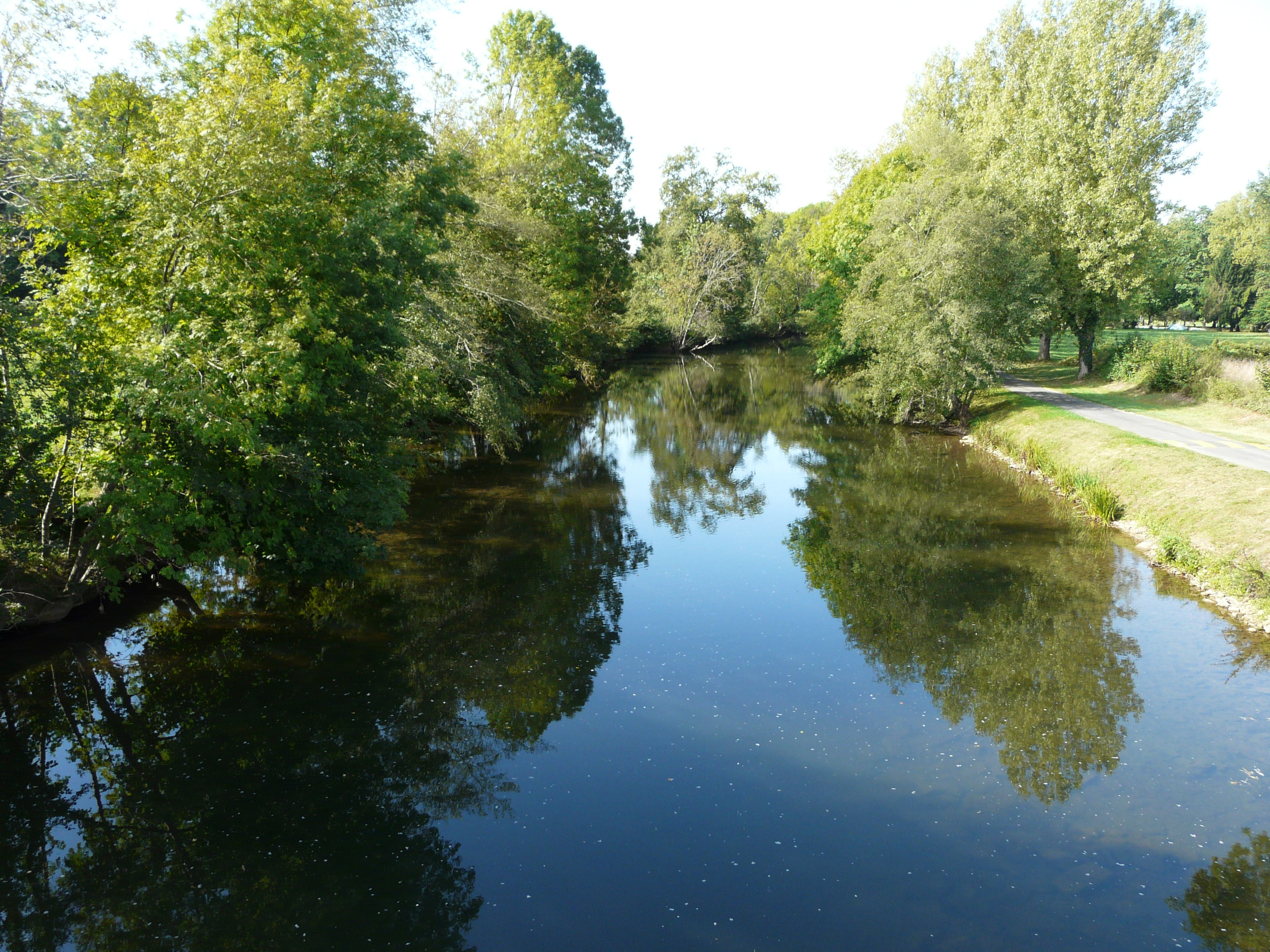 L'Isle en aval du pont de la route départementale 68, Savignac-les-Églises, Dordogne, France